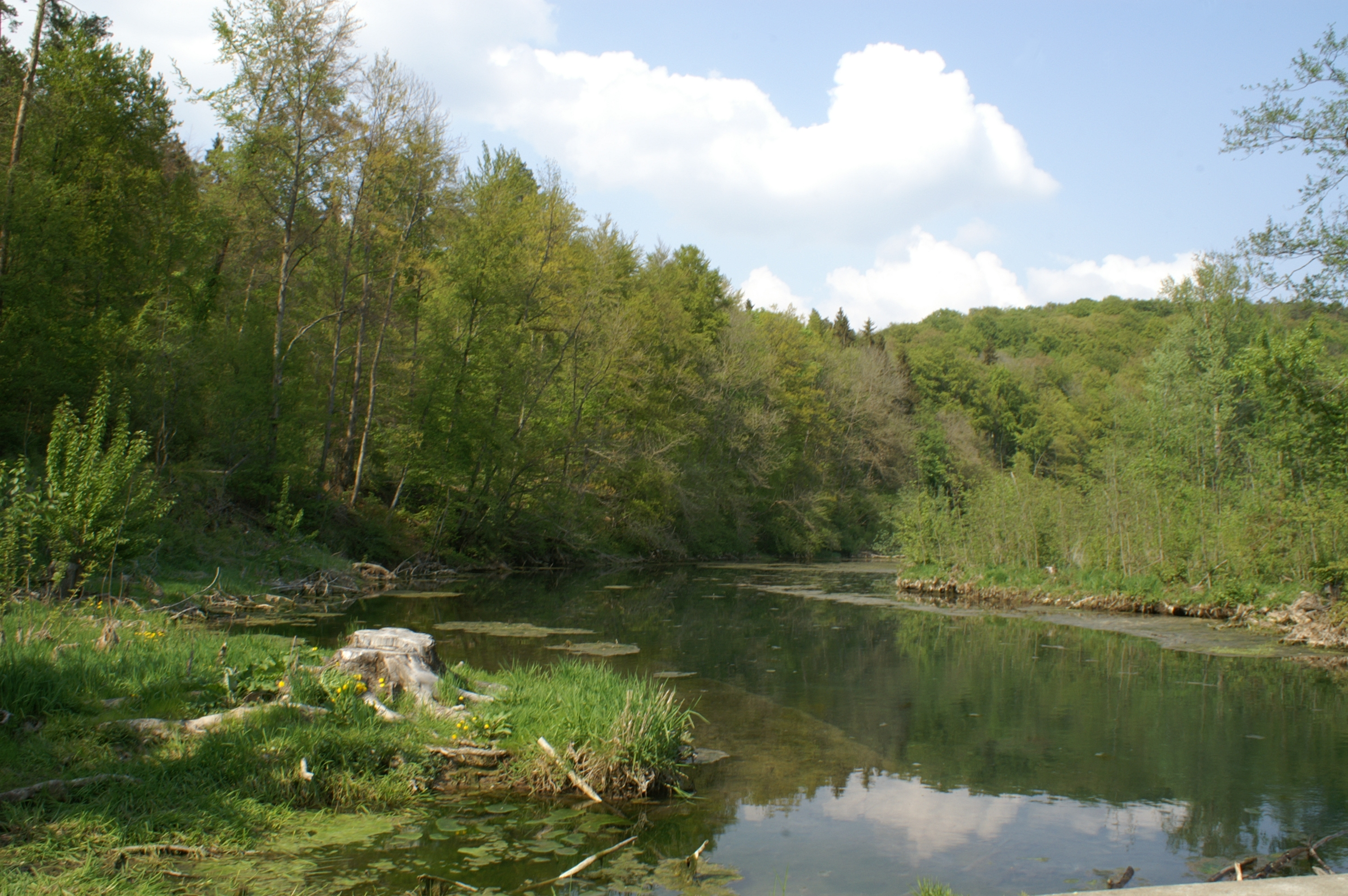 Naturschutzgebiet Braunsel im Alb-Donau-Kreis, Baden-Württemberg